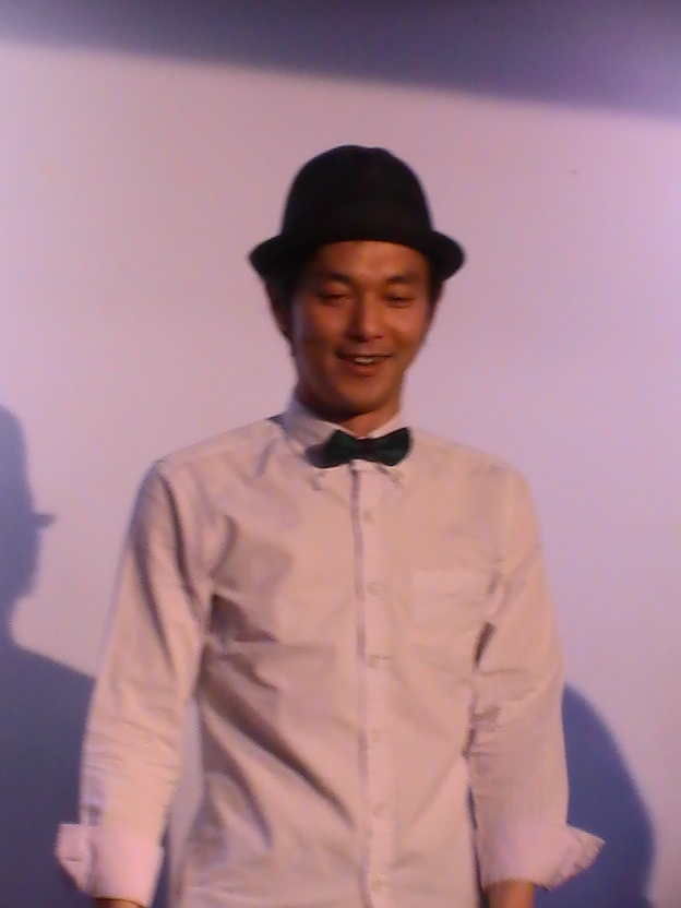 キャプテン渡辺 (2017年5月22日)